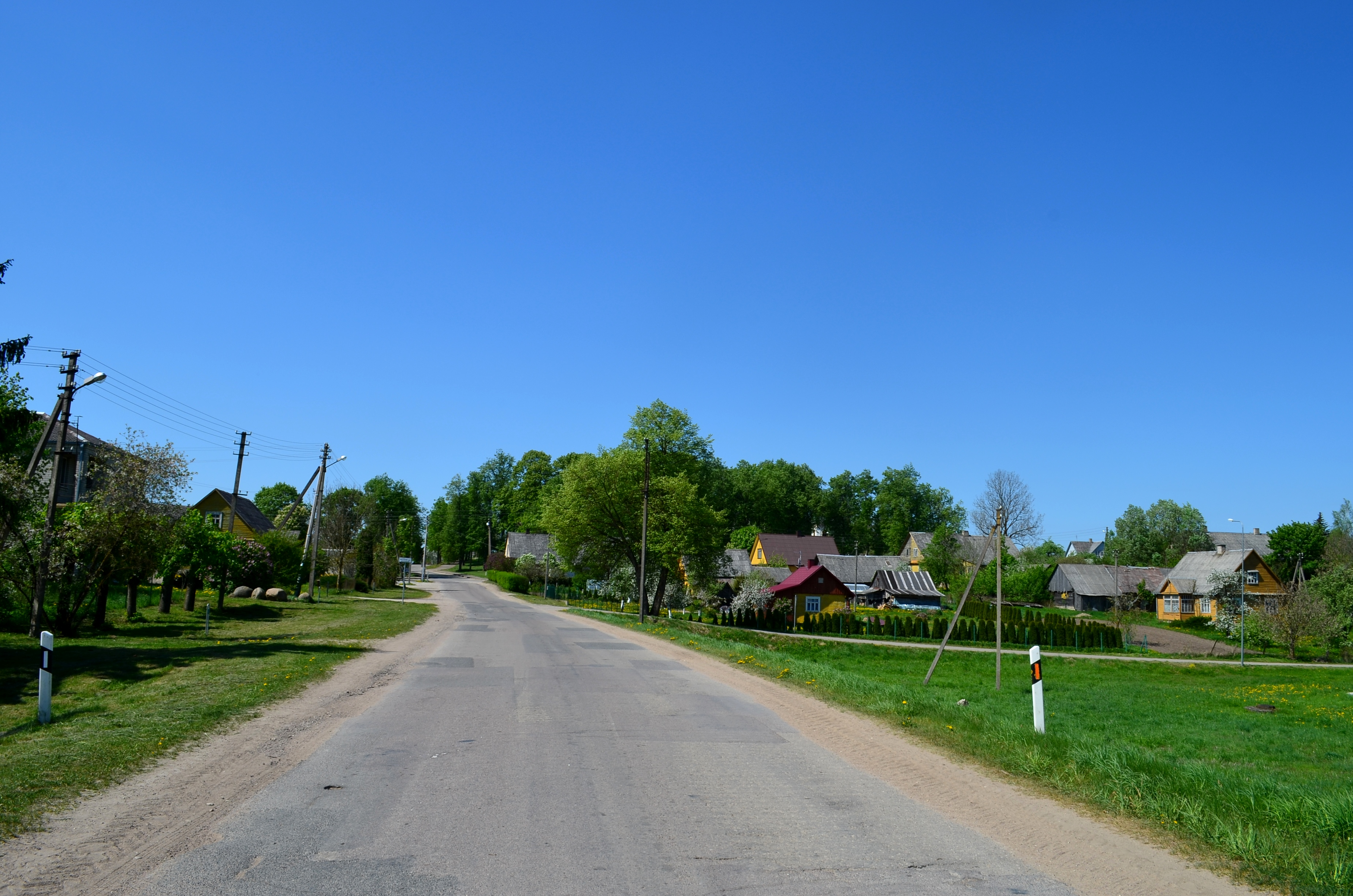 Sodų gatvė, Taujėnų miestelis, Taujėnų sen., Ukmergės raj.